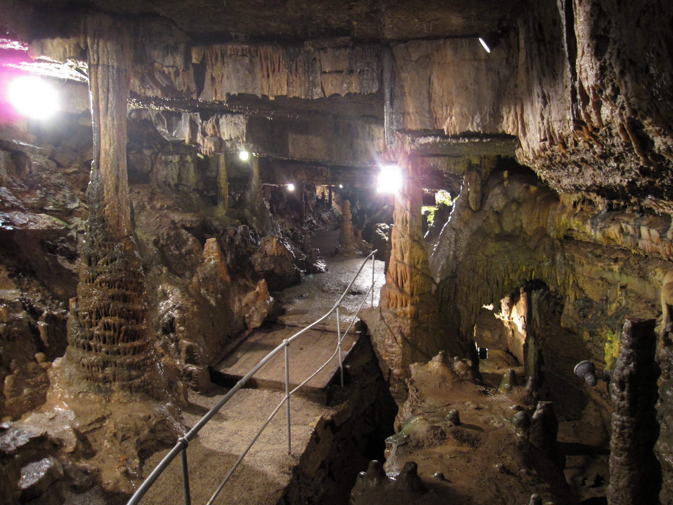 Erdmannshöhle